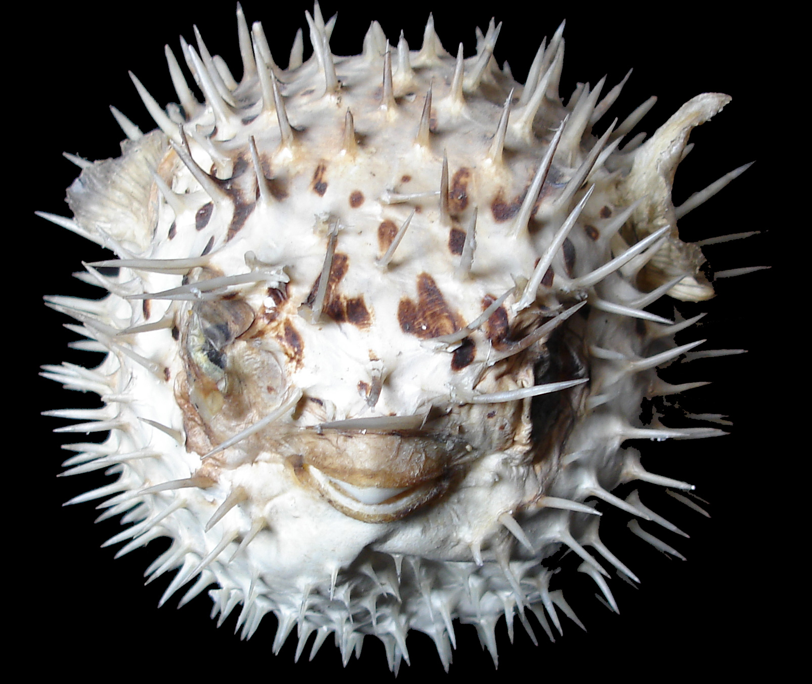 Poisson-ballon mort et sec dead puffer fish